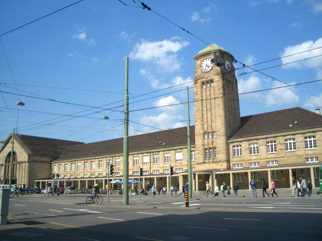 (für die GNU FDL) Kategorie:Bild:Bahnhof (Original text: Basel Badischer Bahnhof)